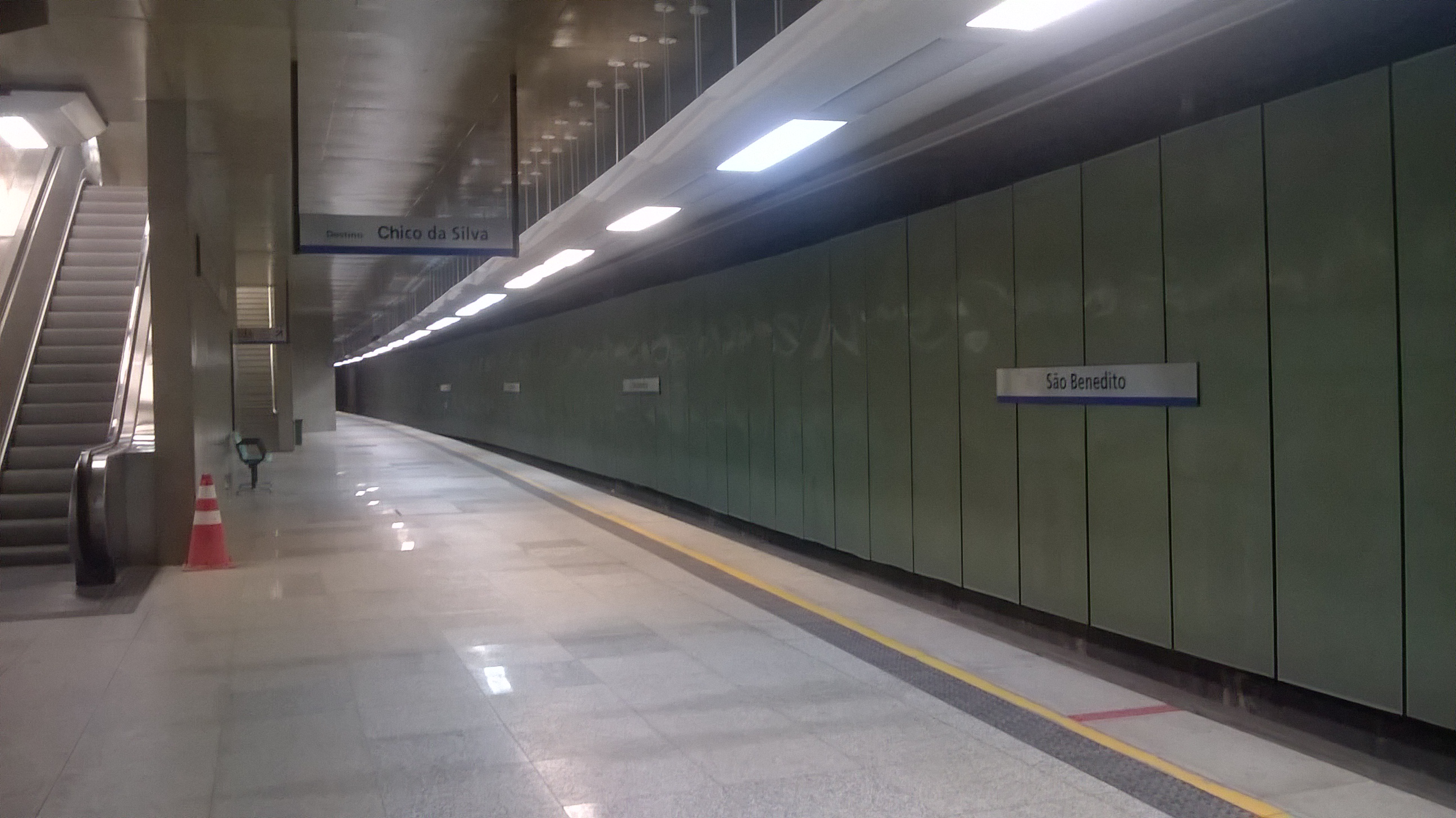 Plataforma da estação São Benedito da Linha Sul do metrô de Fortaleza